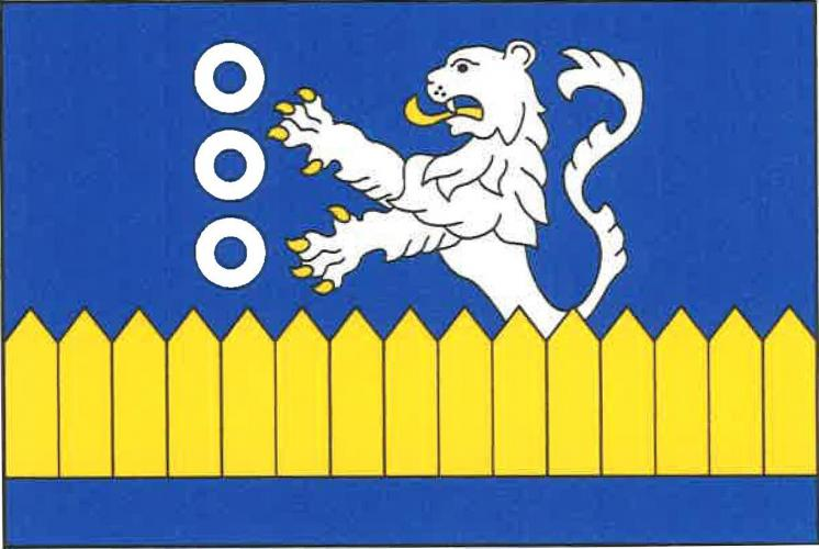 Češov vlajka